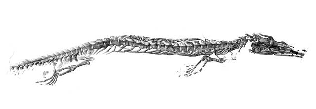 Aigialosaurus dalmaticus holotype.